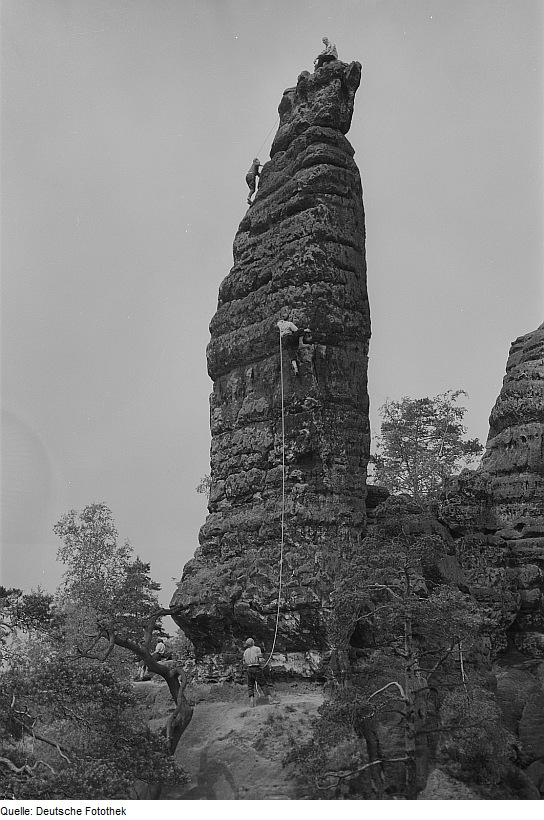 Original image description from the Deutsche FotothekSandsteinfelsen "Tante" in den Schrammsteinen